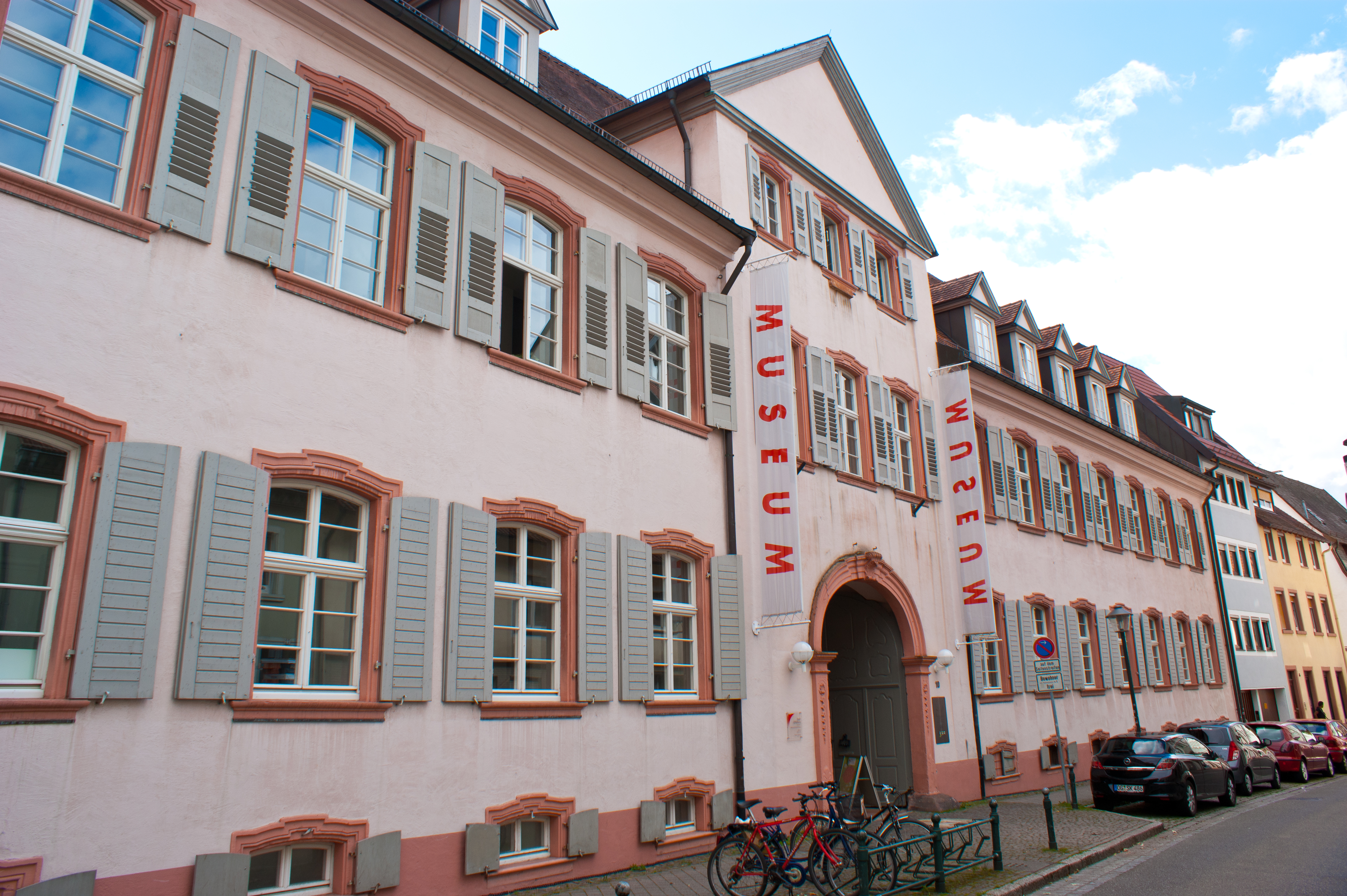 Ritterhausmuseum